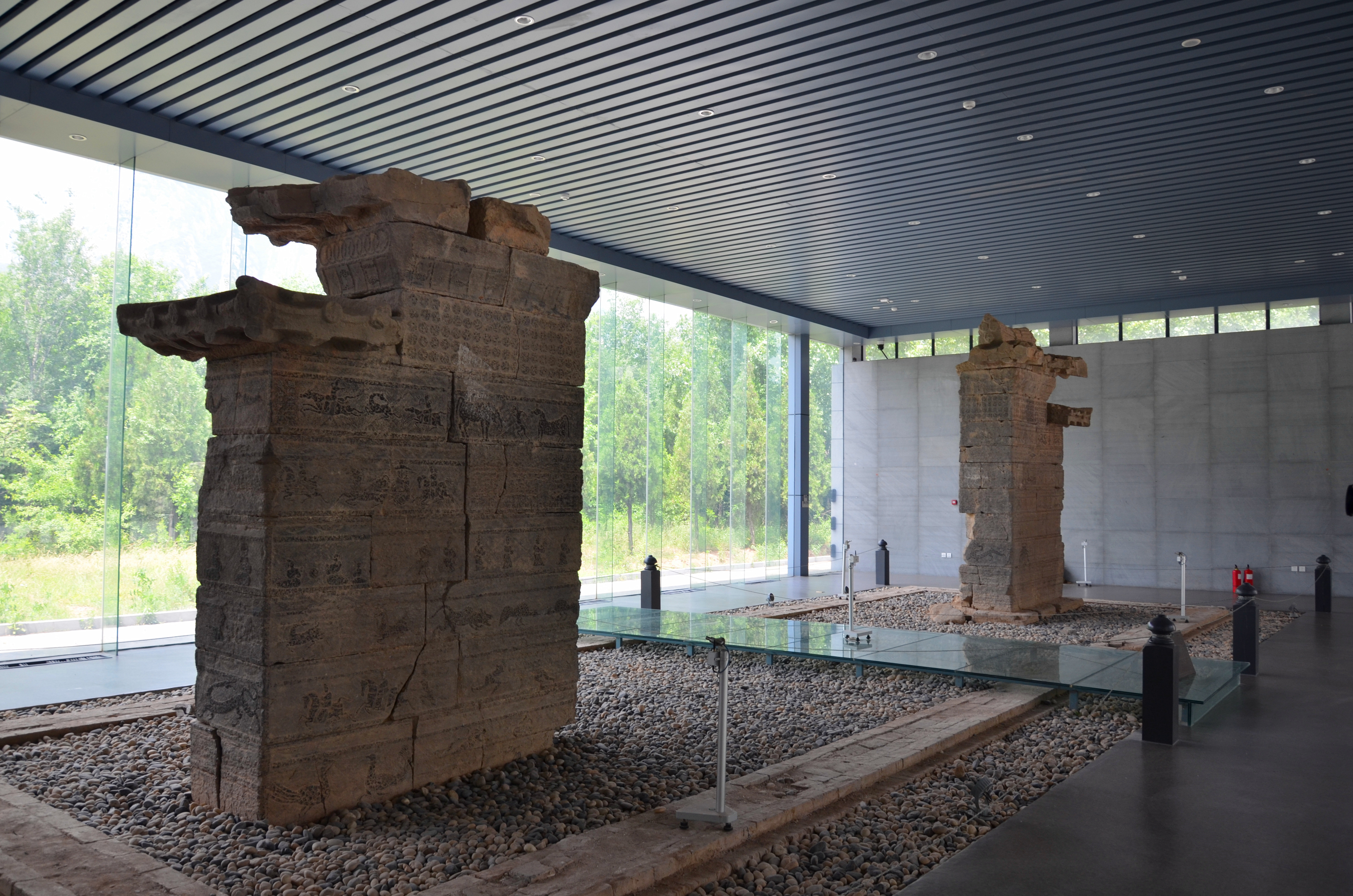 中文（中国大陆）: 少室阙建于东汉，是东汉少室山神的庙宇——少姨庙前的建筑。